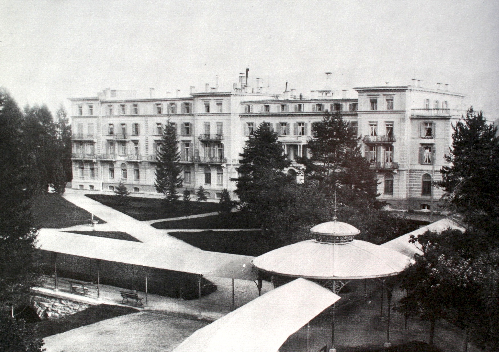 Waldhaus Flims 1906